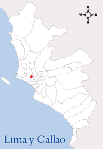 Localización del distrito de Breña Esta imagen ha sido elaborada por --Edgardo Reyes 17:37 9 mar, 2005 (CET) Categoría:Mapas del Perú (imagen)